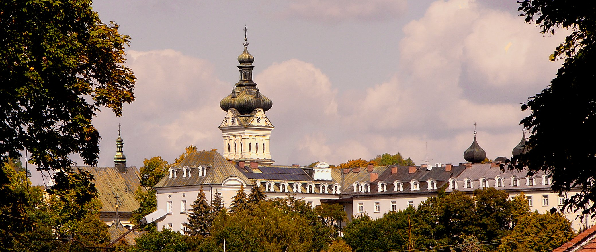 kościół klasztorny redemptorystów p.w. Nawiedzenia NMP, otoczenie, starodrzew Tuchów, Tuchów